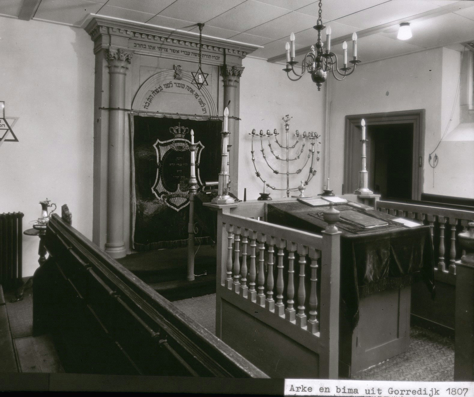 VOORMALIGE SYNAGOGE: INTERIEUR, OVERZICHT